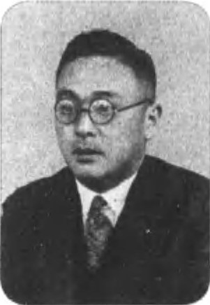 東京朝日新聞社政治部記者の田畑政治。